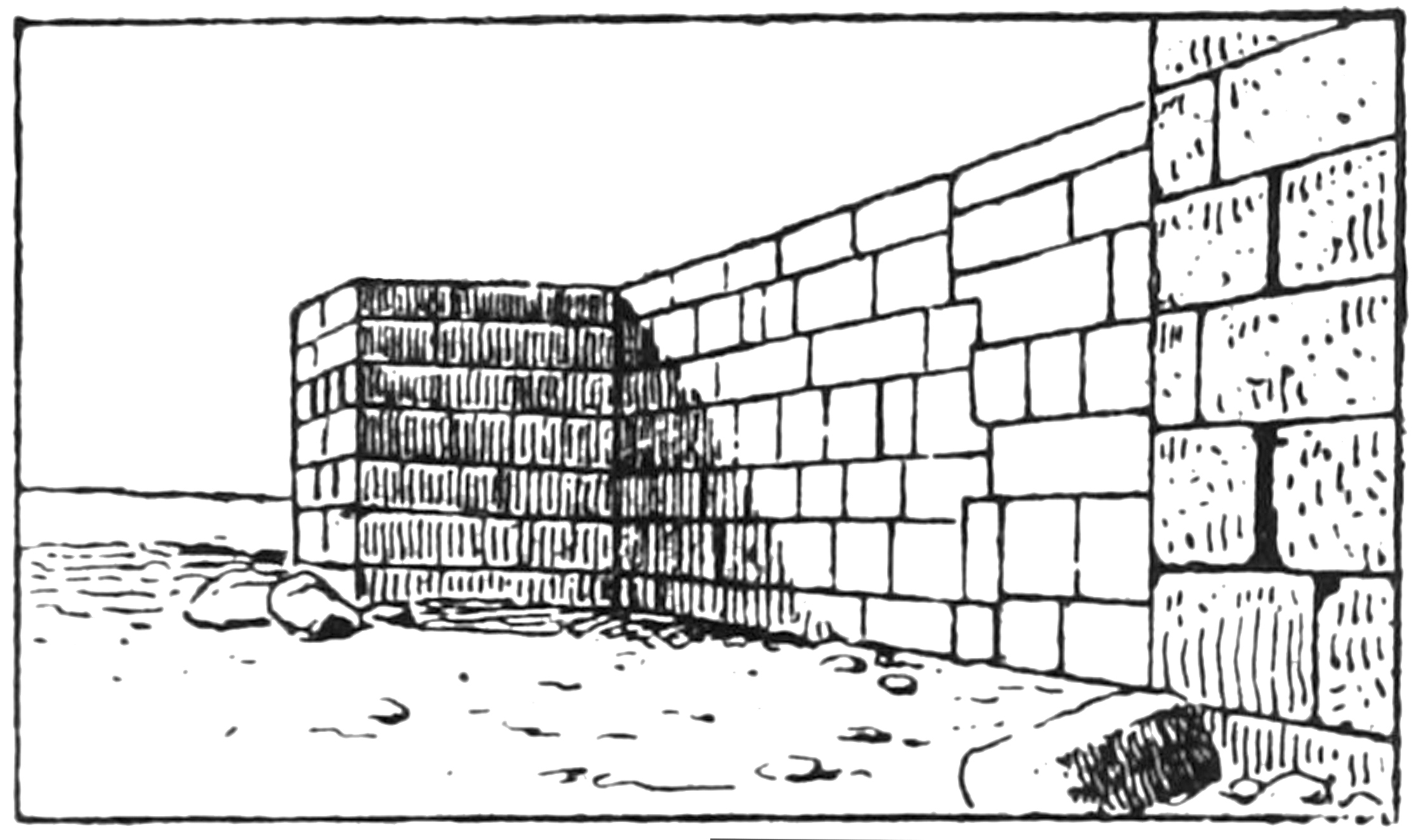 Ansicht des Kleinkastells Benia bel Recheb, Südtunesien: Zustand der Umfassungsmauer mit Eck- und Zwischenturm.